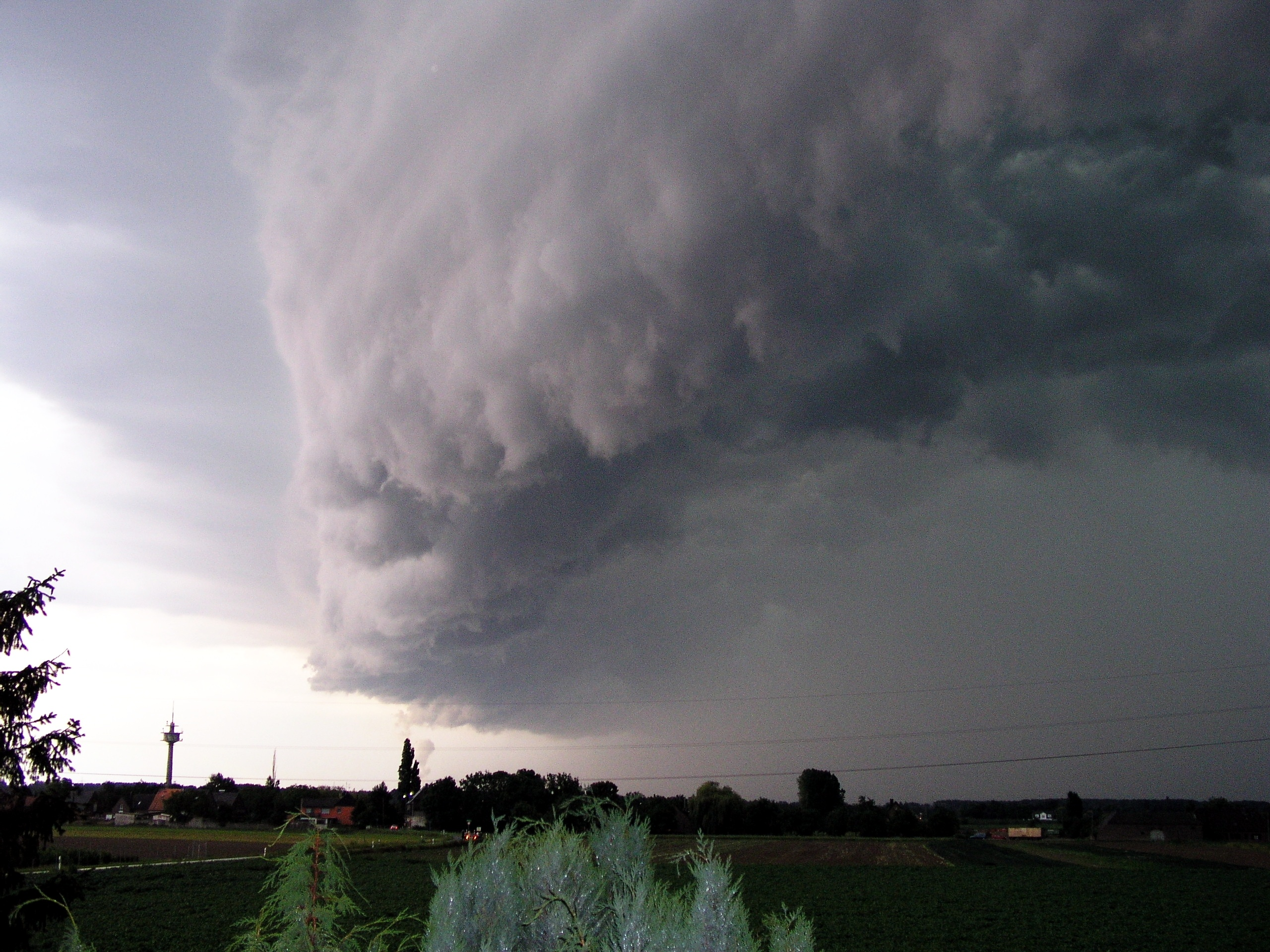 Gewitterfront